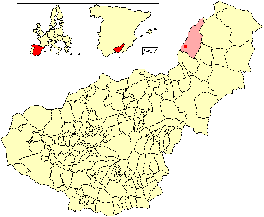 Situación de la localidad de Cebas (en el municipio de Castril) respecto a la provincia de Granada, en España.